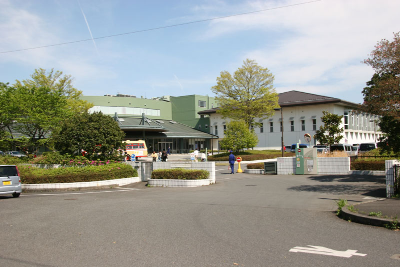 Takao-no-mori Wakuwaku Village (高尾の森わくわくビレッジ) in Hachioji, Tokyo, Japan